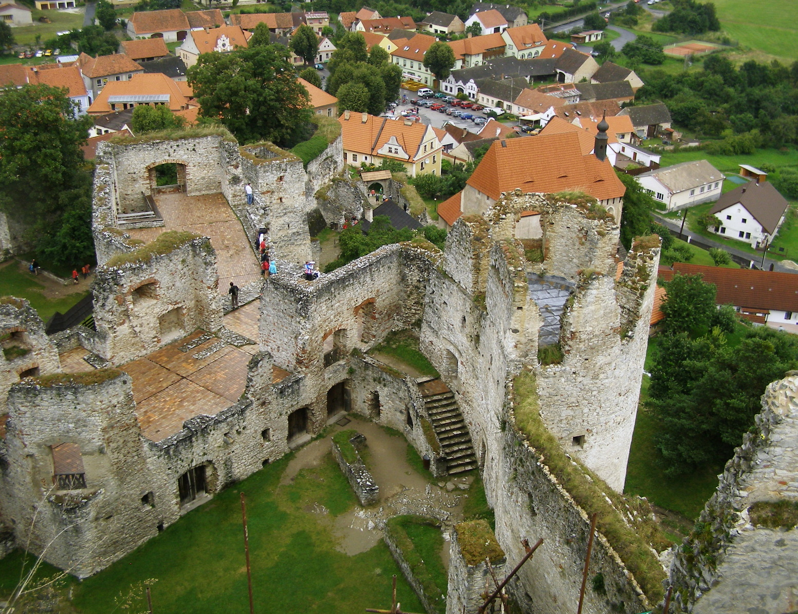 Hrad Rabí - pohled z věže na zbytky obytných budov